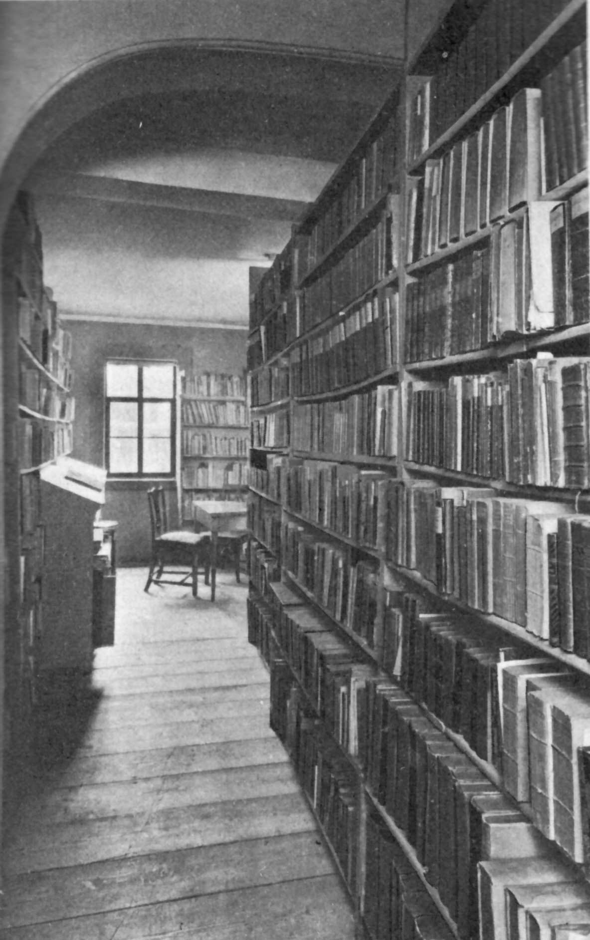 Goethes Bibliothek am Frauenplan in Weimar, heute Deutsches Goethe-Nationalmuseum